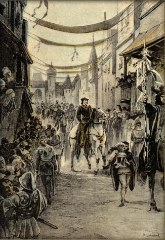 Adolf Liebscher - Slavný vjezd krále Ladislava do Prahy r. 1453